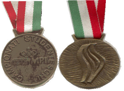 Medalla Juegos de la Juventud Italiana (Buenos Aires, Argentina).